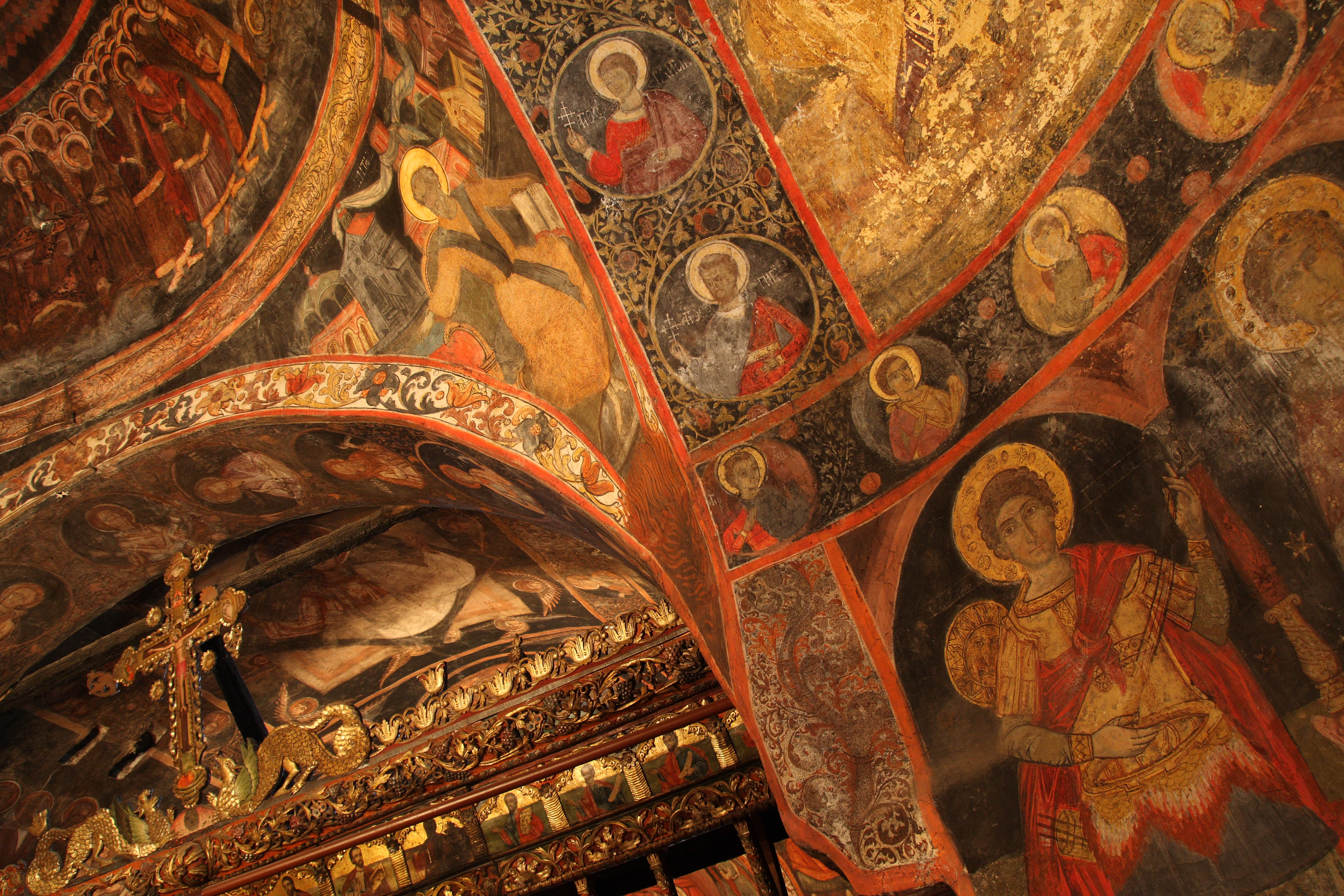 Church of Sveta Arhangeli Mikhail & Gavril, Arbanasi, Bulgaria